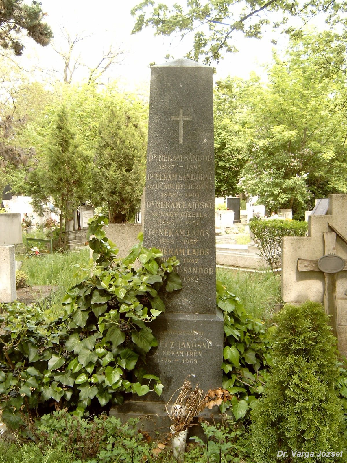 Nékám Sándor (Pest, 1827. febr. 28. – Bp., 1885. aug. 26.) matematikus, egyetemi tanár és a Nékám család sírja Budapesten. Új köztemető: 22/2-1-9.